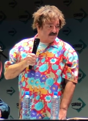 Andrés Bustamante en una conferencia (circa 7:30)